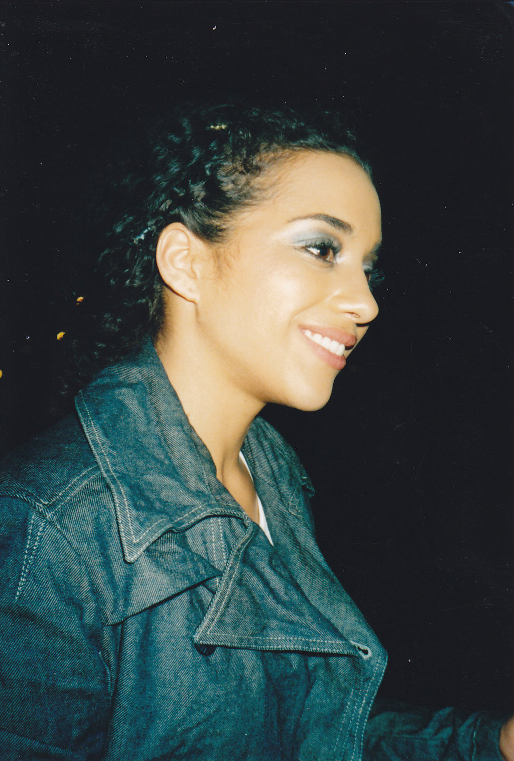 Nadja von den No Angels (2002)